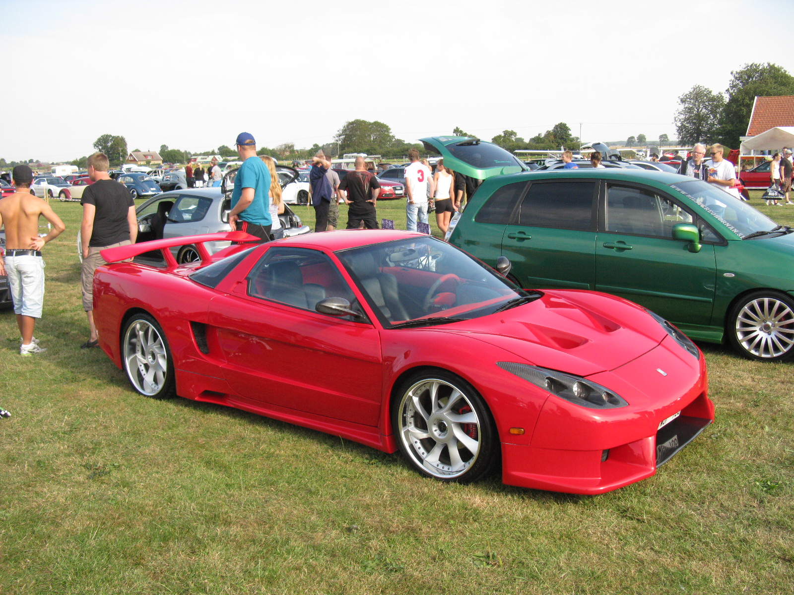 Honda NSX